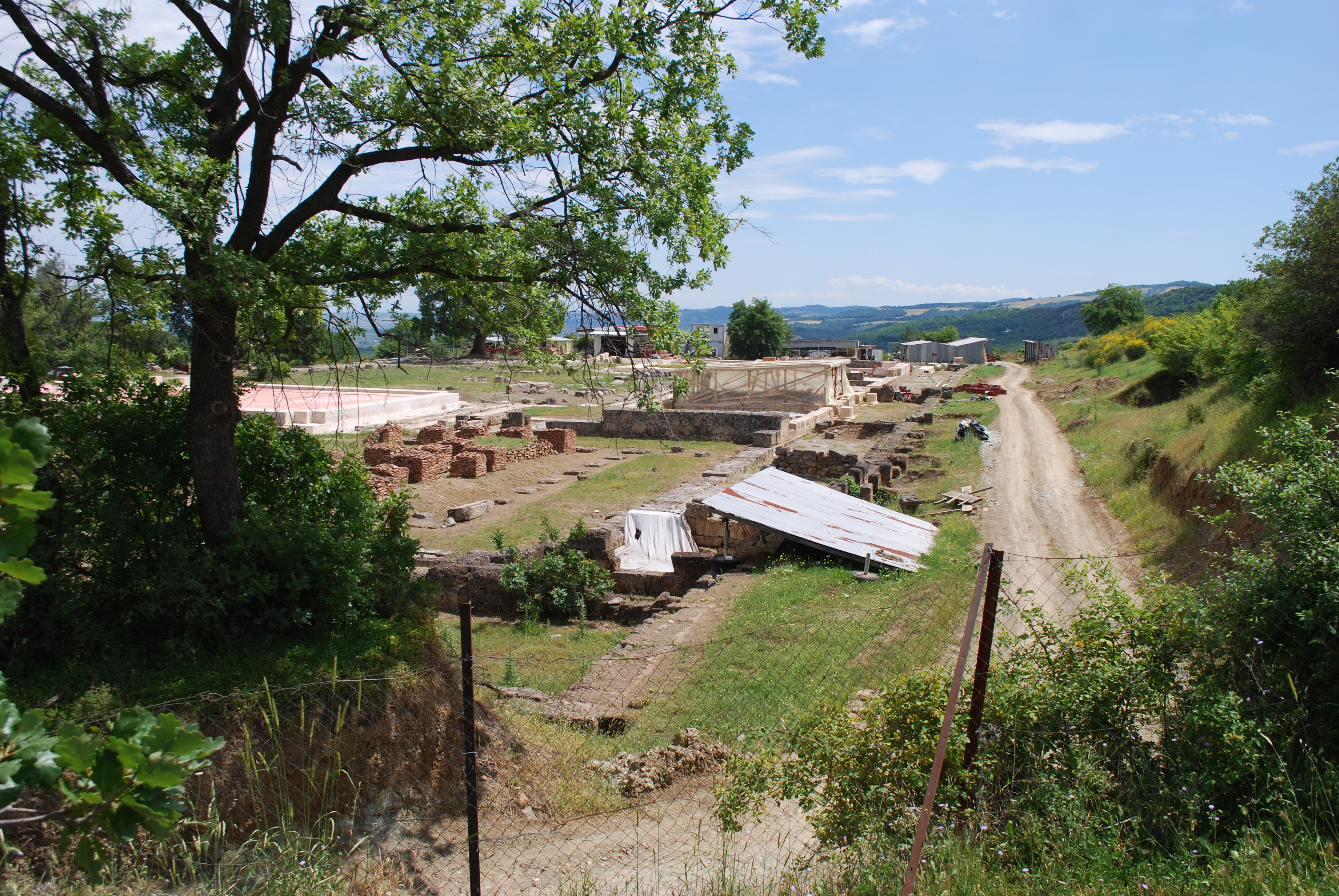 Vue de Vergina.